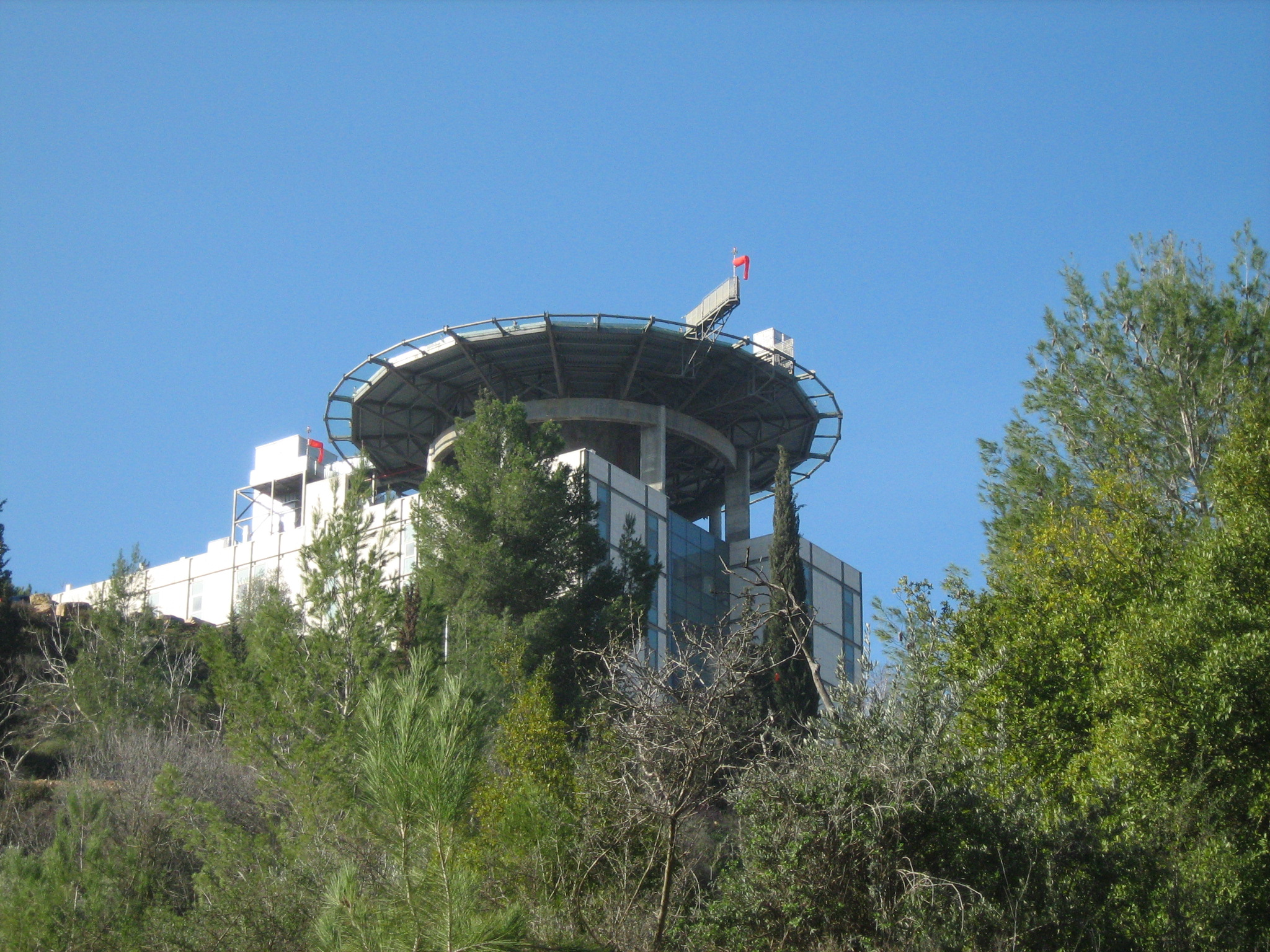 הדסה עין כרם מכיוון הסטף